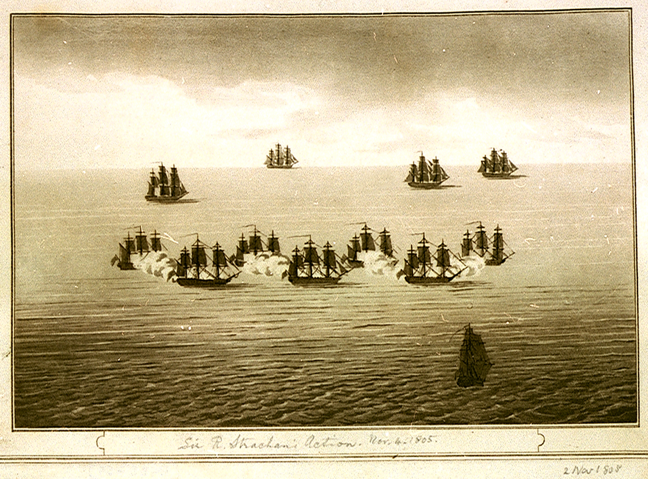 Сражение у мыса Ортегаль между французской и британской эскадрами